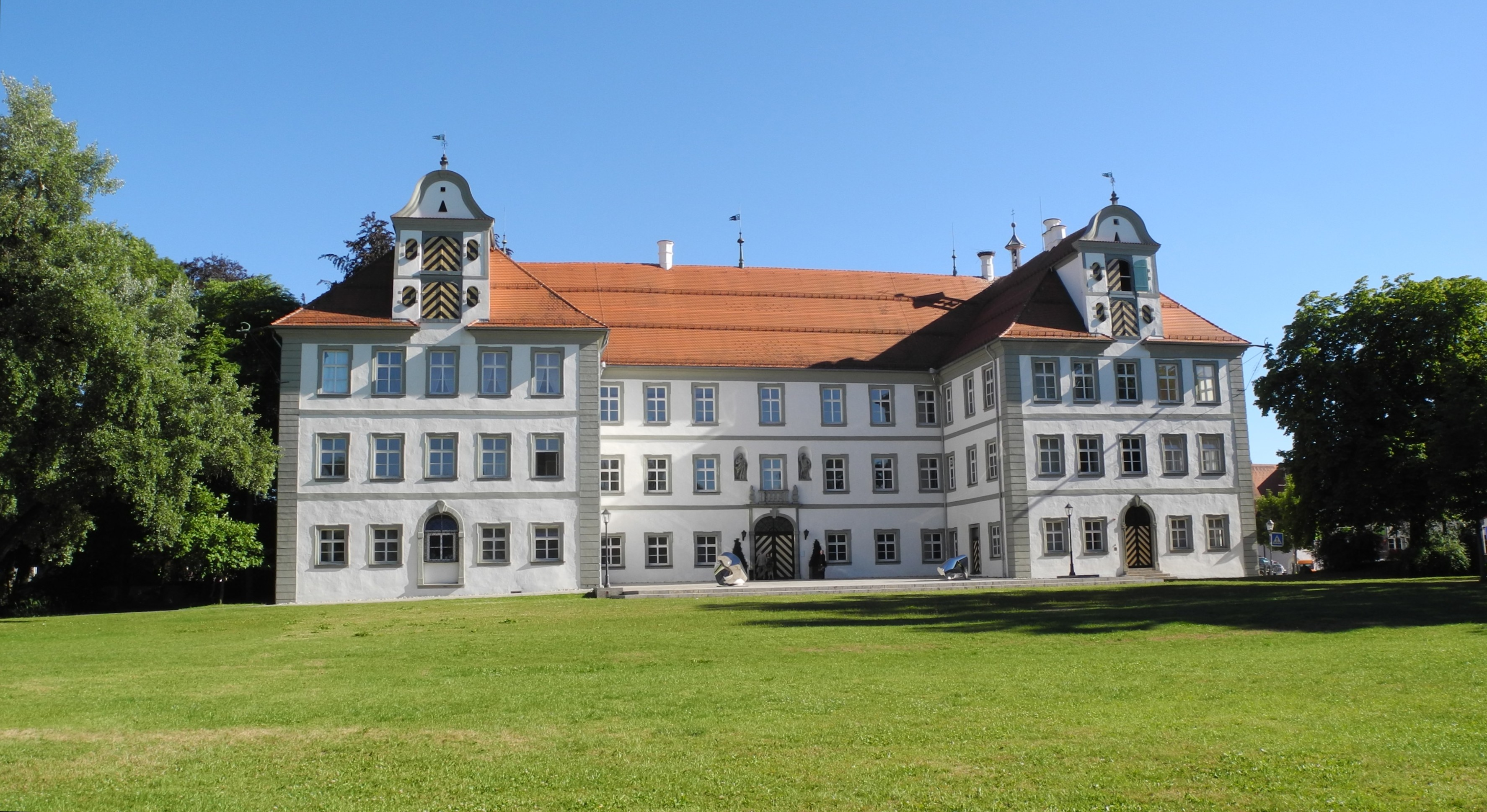 Kißlegg - Neues Schloss 1721-27 erbaut